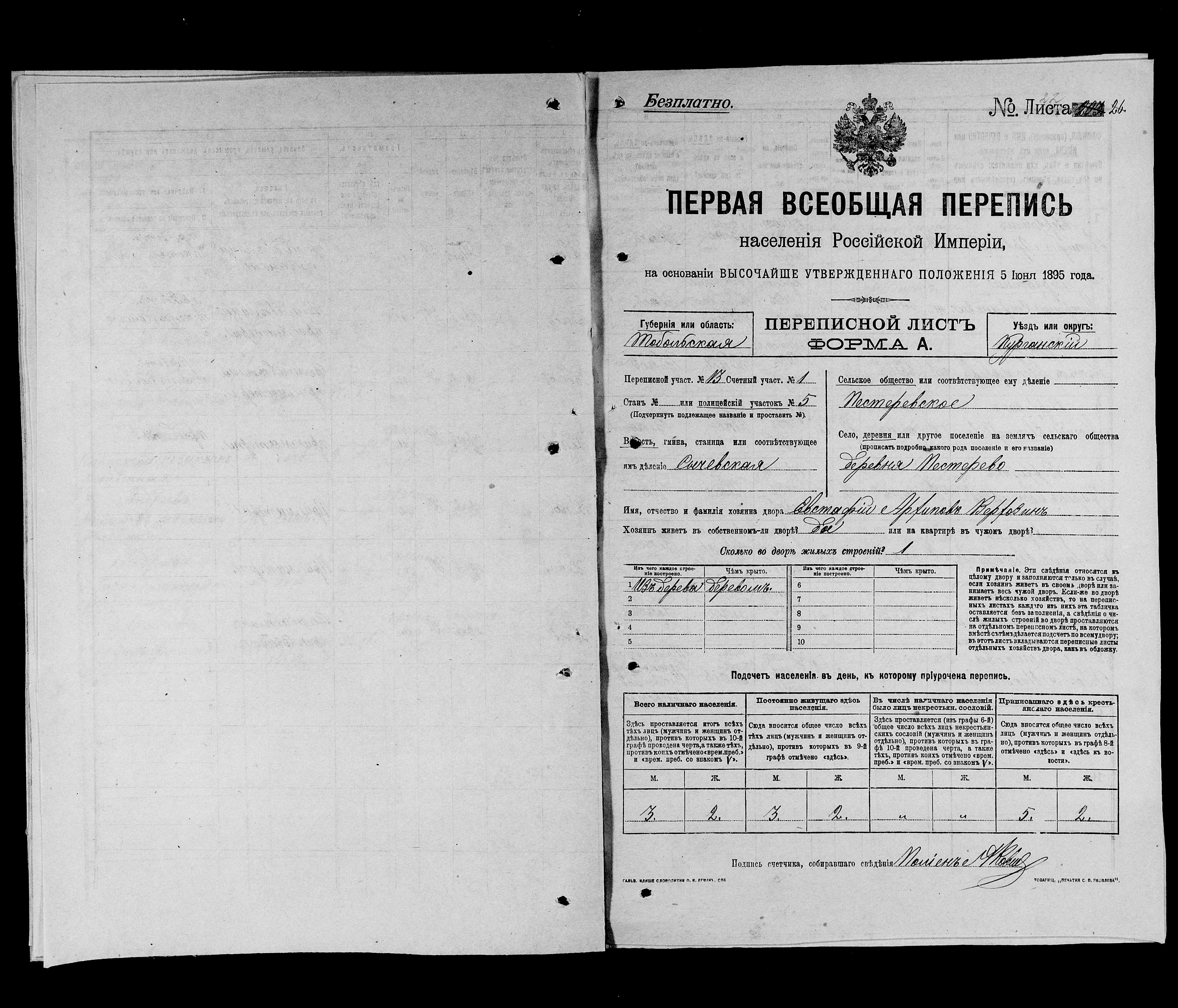 Перепись 1897, Тобольская губерния, д. Пестерево, двор Е.А. Верхозина